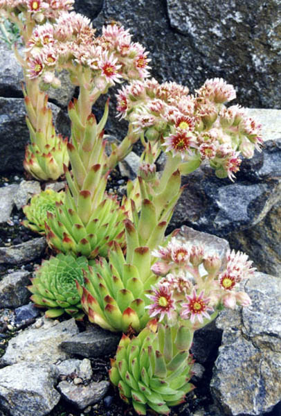 Sempervivum tectorum